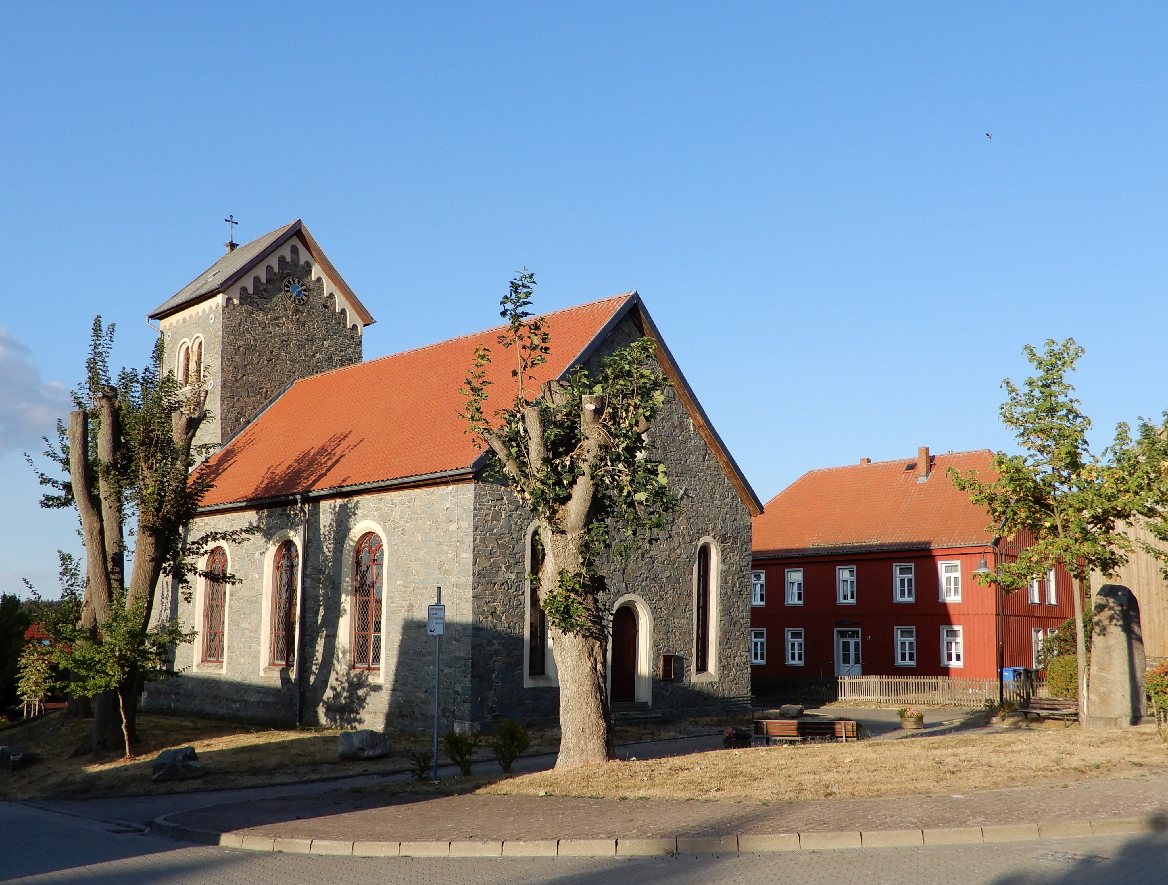 Kirche St. Petrus Allrode